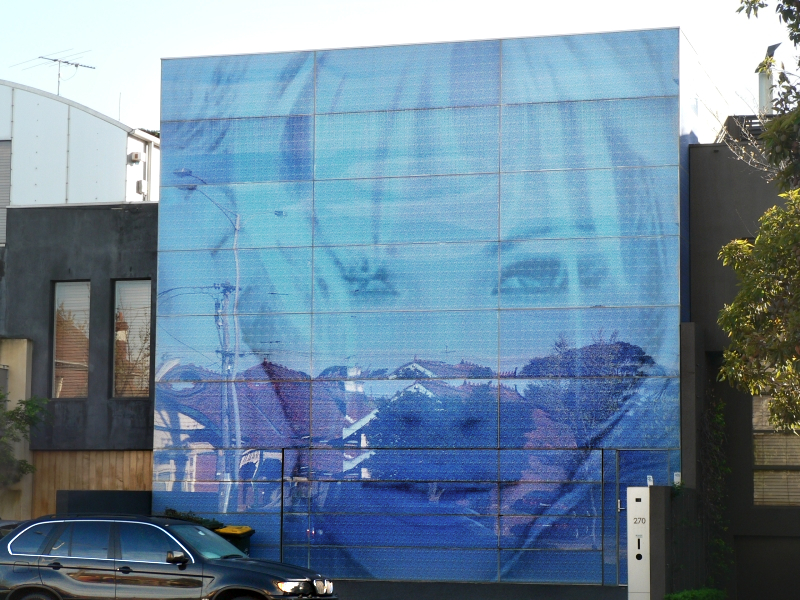 Pamela Anderson House in St Kilda